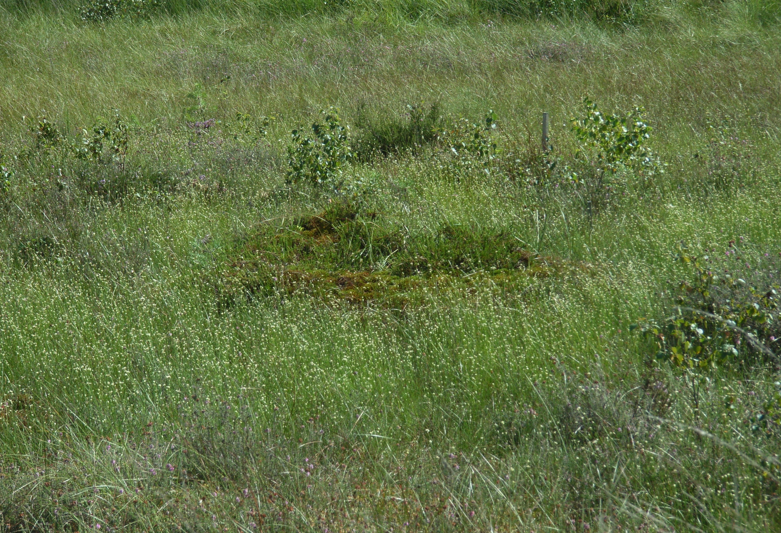 Bult-Schlenken-Komplex mit Weißem Schnabelried (Rhynchospora alba) in tiefer gelegenen Bereichen in einem regerierenden Regenmoor in Nordwestdeutschland